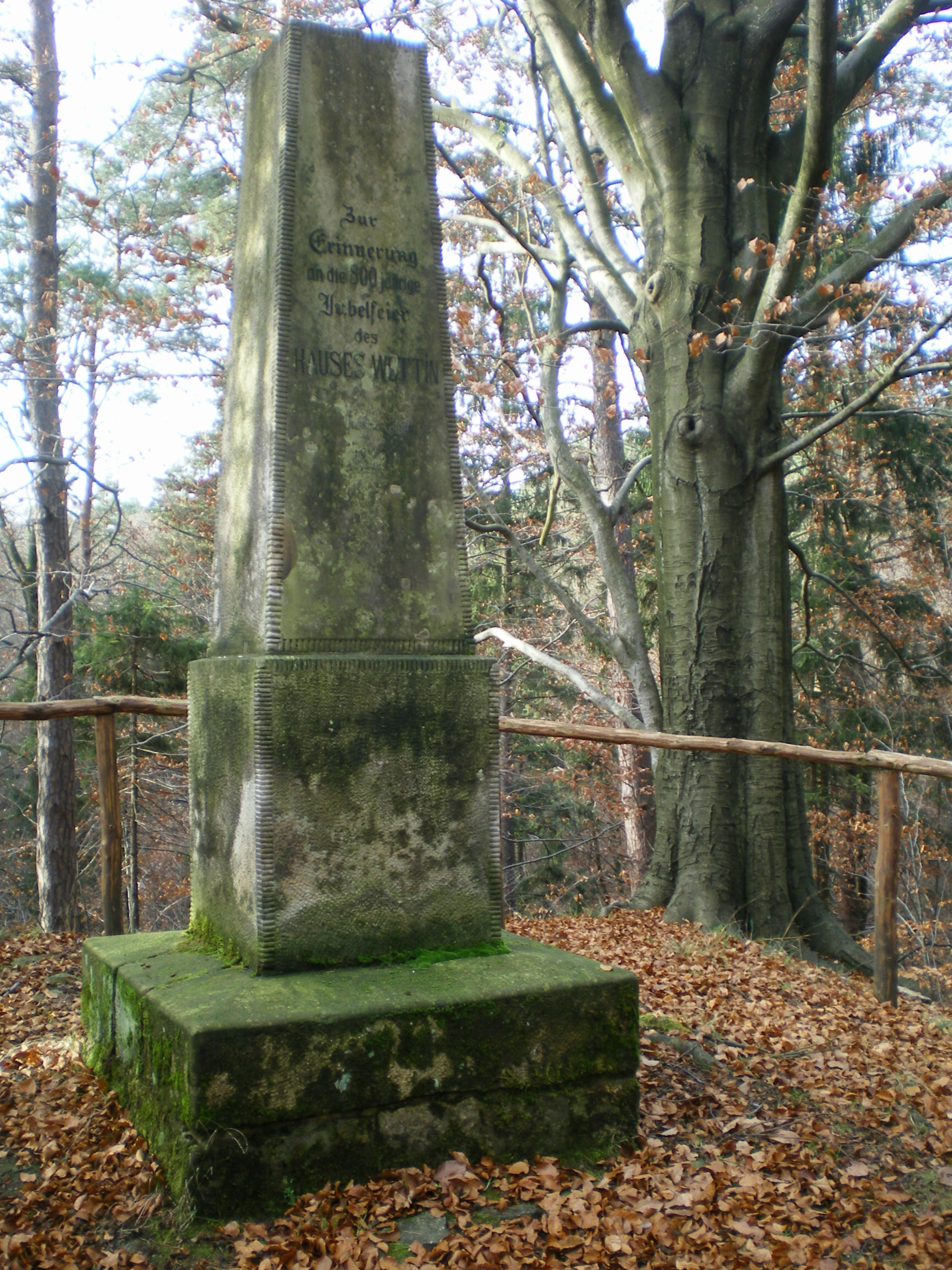 Dresdner Heide-Wettinsäule 2009: Die Wettinsäule ist ein Denkmal im Prießnitzgrund nahe der Kannenhenkelbrücke. Sie ist als Obelisk ausgeführt und nach dem sächsischen Königshaus der Wettiner benannt. Dieses beging im Jahre 1889 anlässlich seines 800-jährigen Bestehens eine Jubelfeier, aus deren Anlass die Säule in Erinnerung daran aufgestellt wurde.